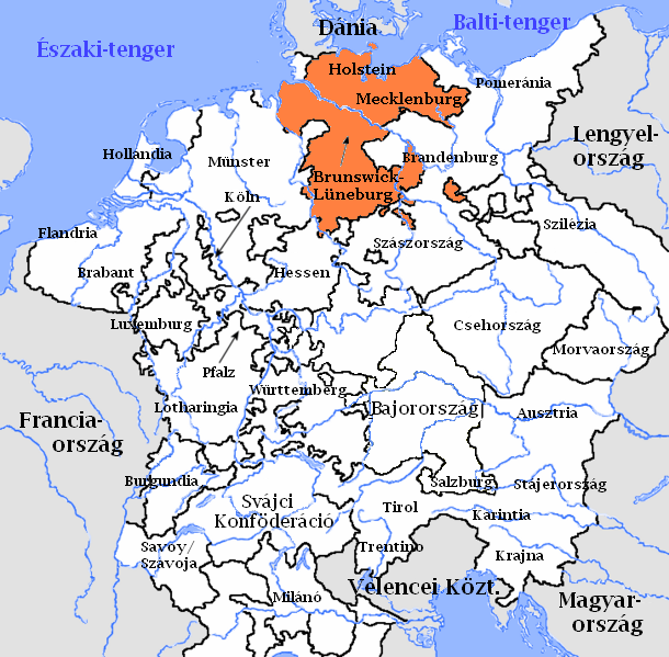 Az Alsó-szászországi körzet a Német-római Birodalomban